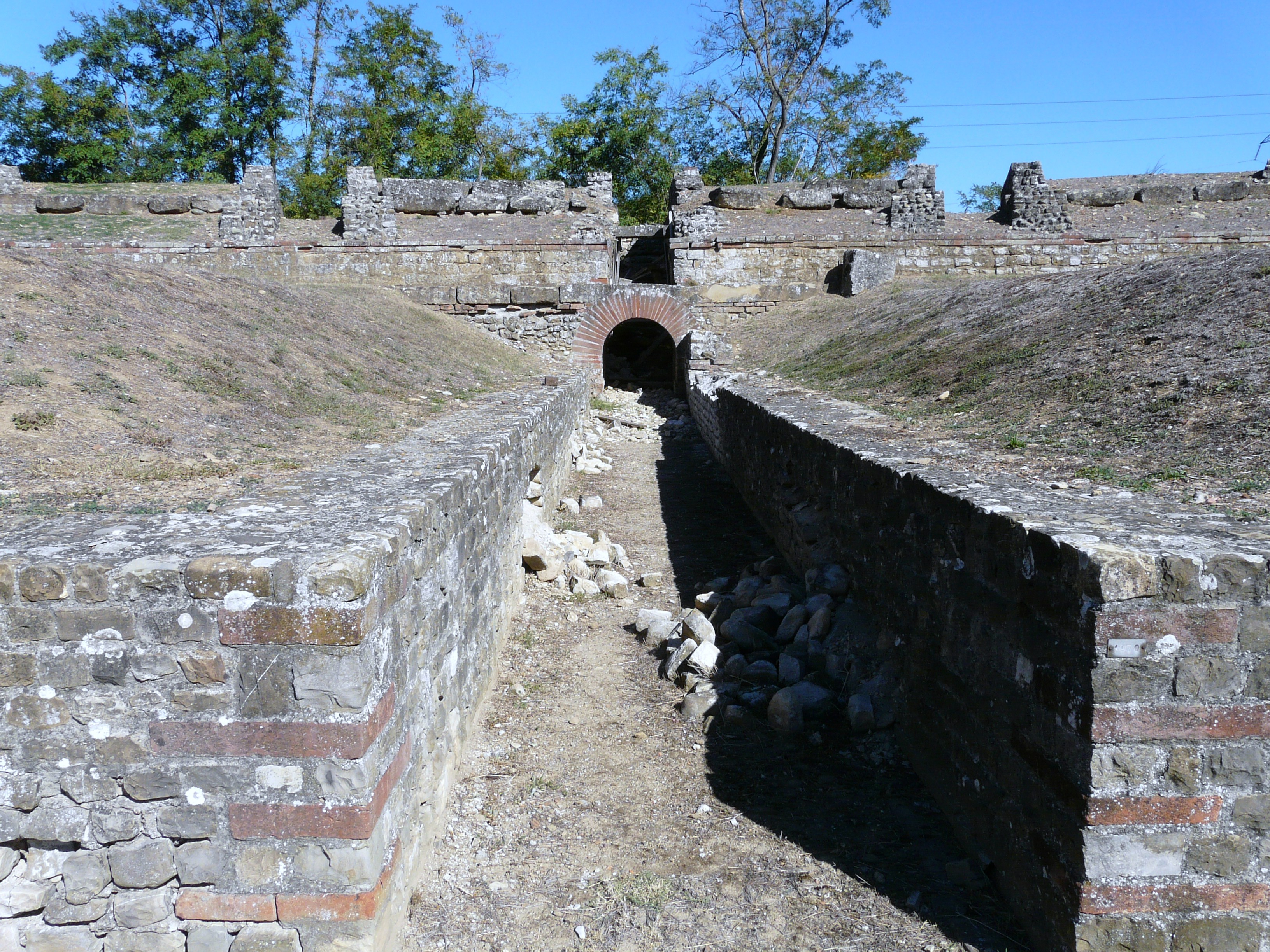 Immagini varie dei ritrovamenti dell'antica città romana di Libarna, oggi frazione di Serravalle Scrivia, Piemonte, Italy